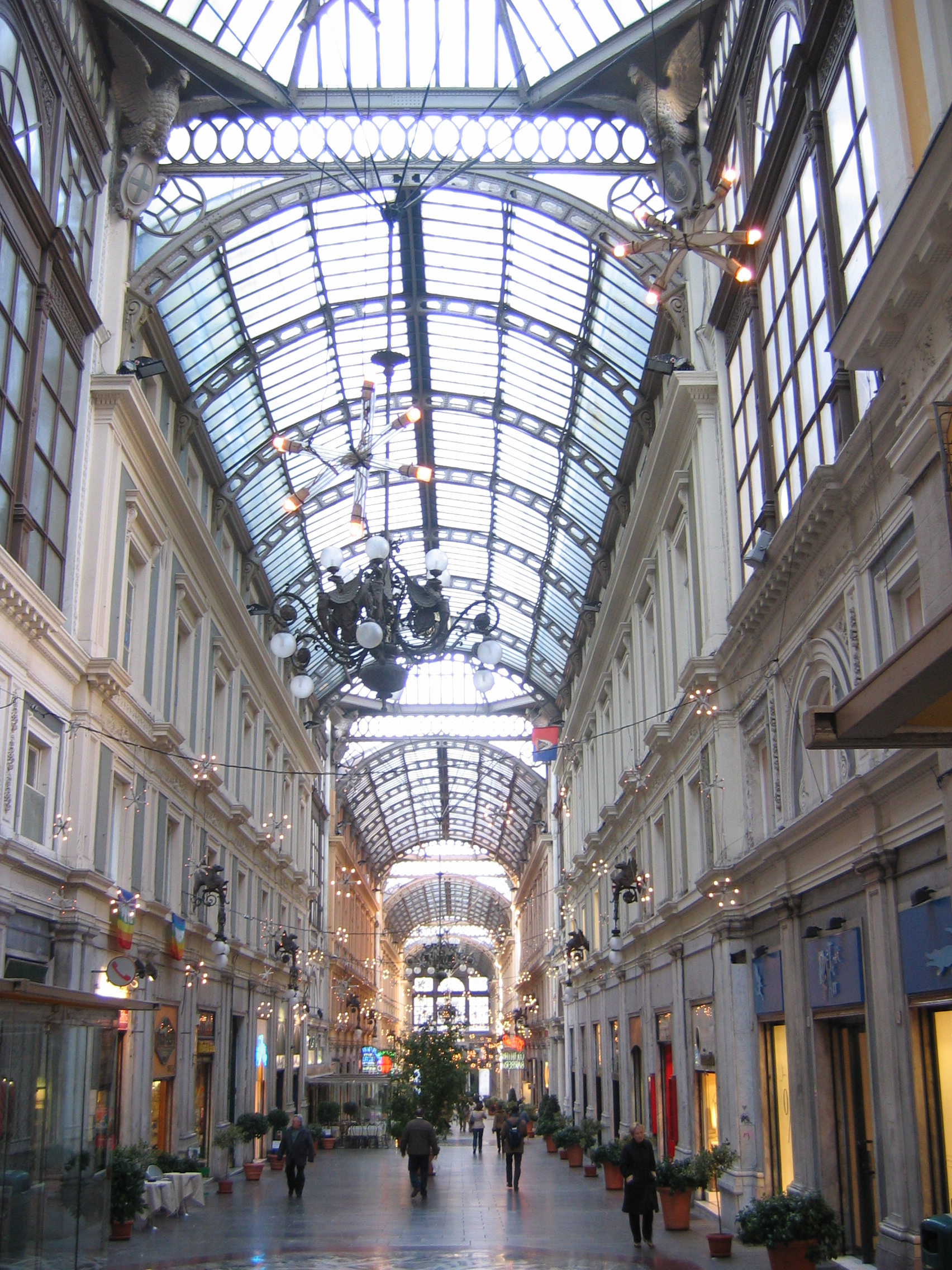 La Galleria Mazzini di Genova. author: Paolo Benvenuto, shot the photo. 1880s. Today.